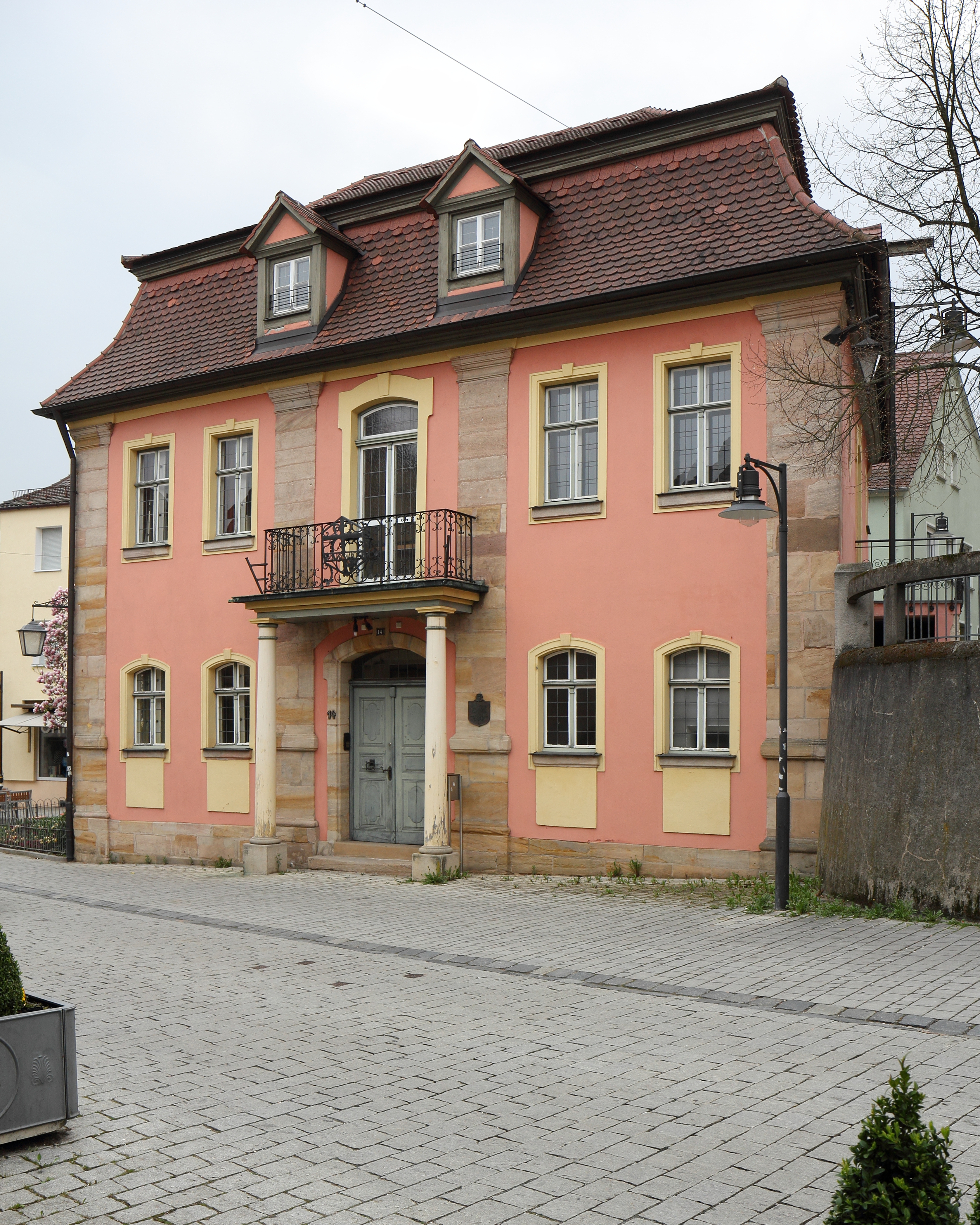 Roth - Hauptstraße 14 - Altes Rathaus. Zweigeschossiger Mansarddachbau im Ansbacher Rokoko, 1758/59.